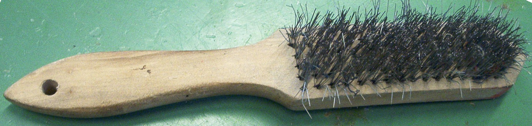 Drahtbürste